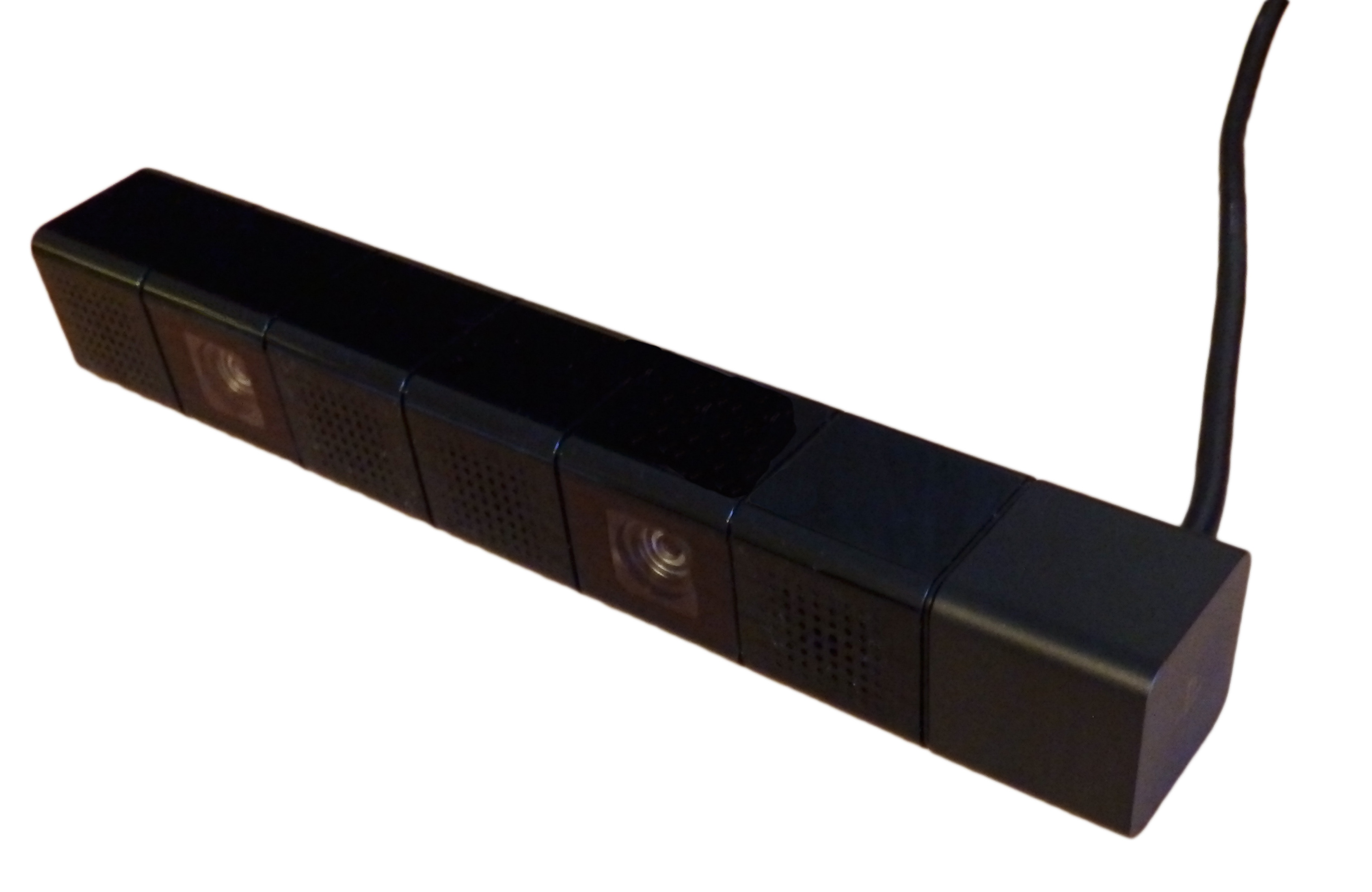 Kamera der PlayStation 4